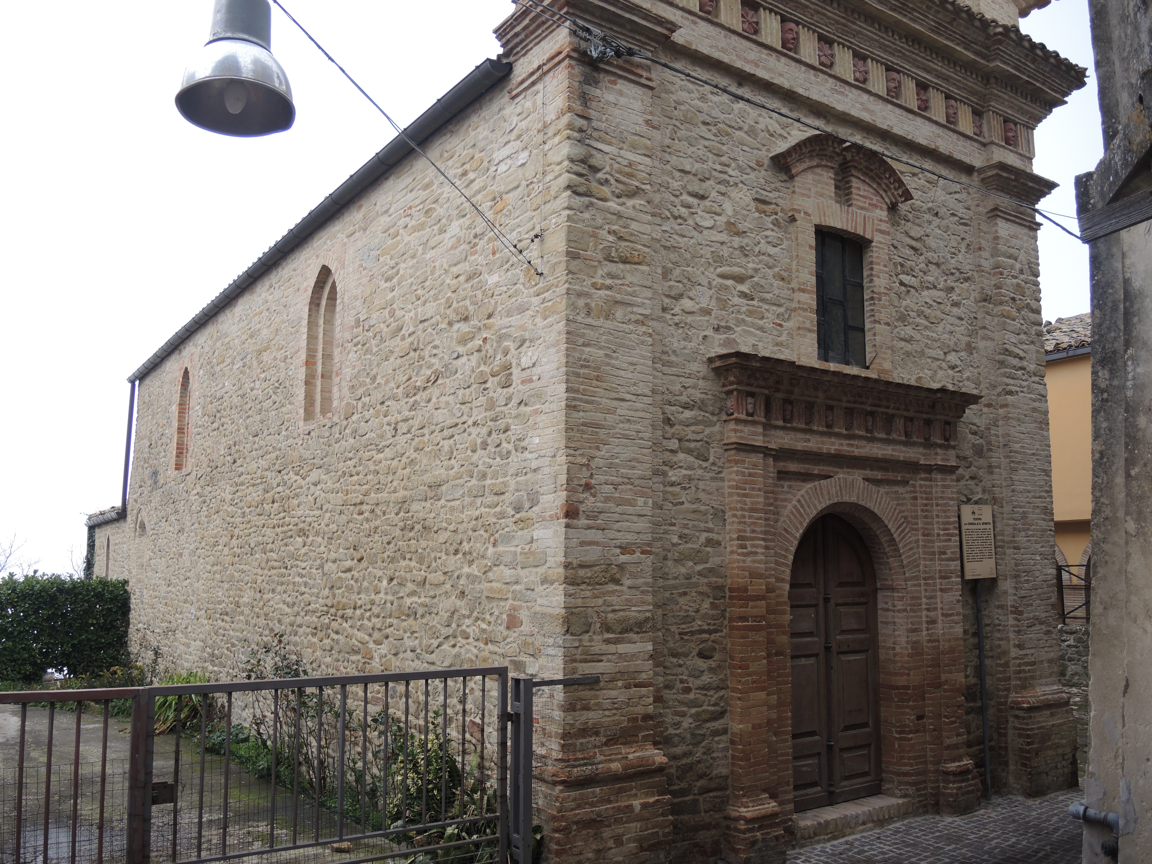 Cellino Attanasio - Chiesa di Santo Spirito